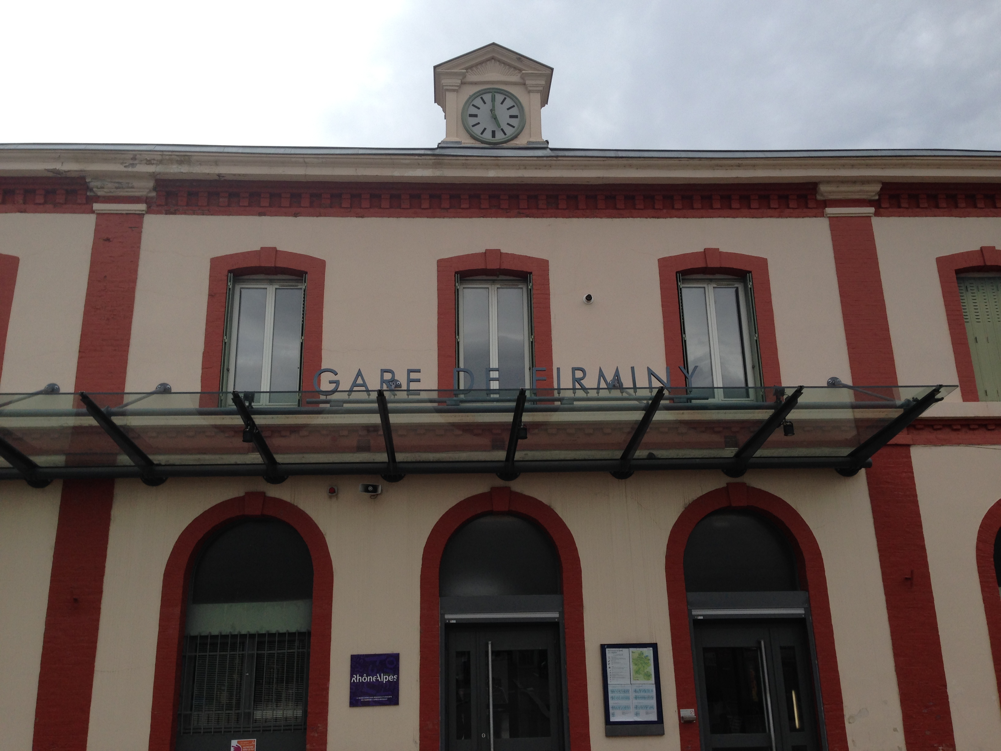 Gare de Firminy-2014